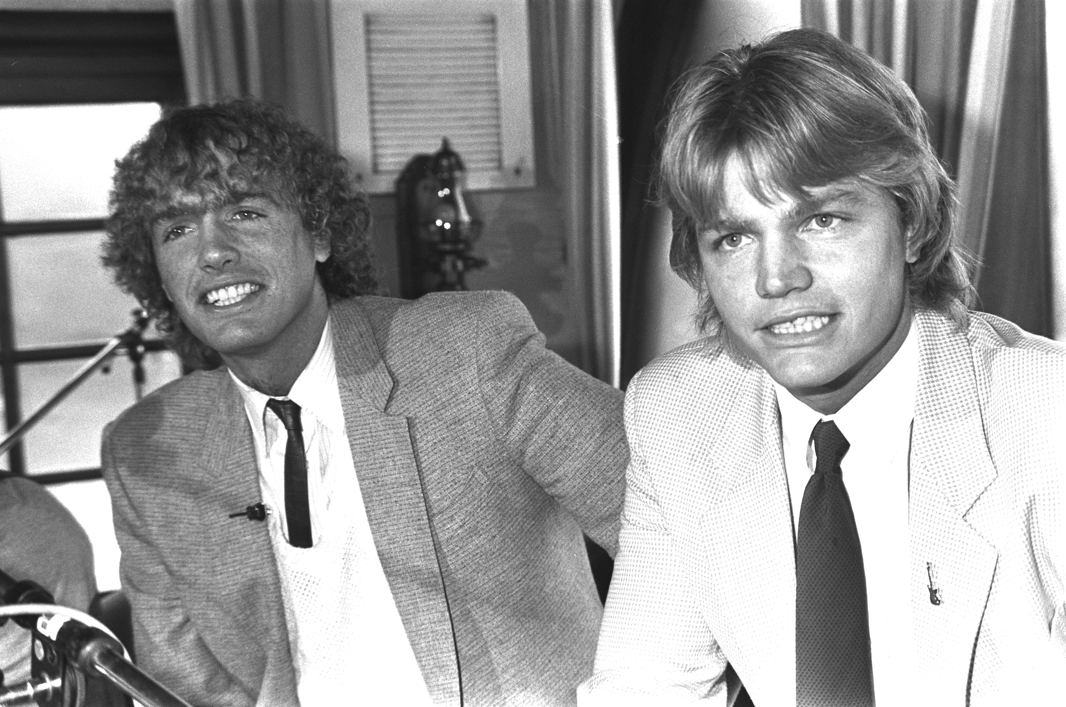 Diverse Nederlandse artiesten maken hun opwachting in het radioprogramma Open House. Bolland & Bolland